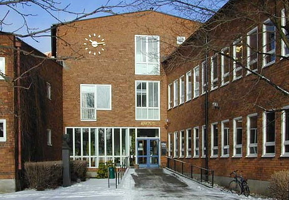 Karolinska Institutet, "Anatomen" (idag Wargentinhuset) Arkitekt Ture Ryberg. Foto taget 1999 av J Brask